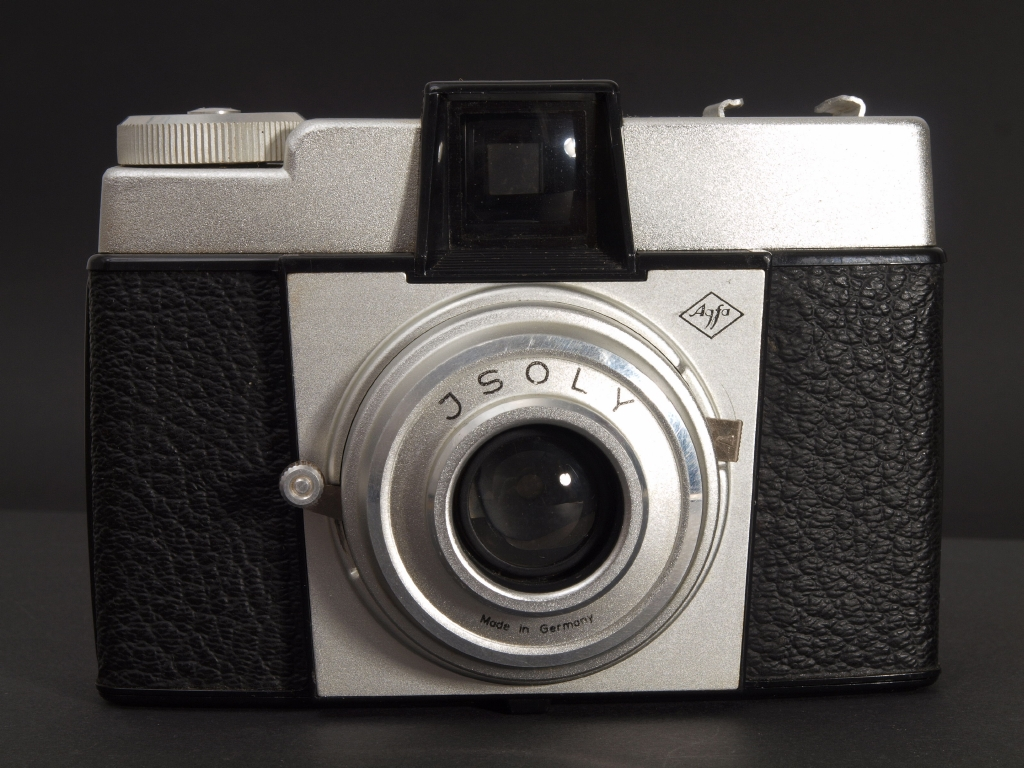 Agfa Isoly Typ 1100. Einfacher Fotoapparat für Rollfime (120) im Format 4x4 cm mit 16 Aufnahmen. Meniskusobjektiv, eine Belichtungszeit 1/30 sec und 2 Blenden 16 und 11, keine Entfernungseinstellung, jedoch „Nahaufnahmen“ 2,5m -5m über eine einschwenkbare Linse, Filmtransport und Spannen des Verschlusses mit Auslösung getrennt. Um Doppelbelichtungen zu vermeiden Kontrollfenster neben dem Filmtransportrad. Zubehörschuh mit Mittenkontakt!